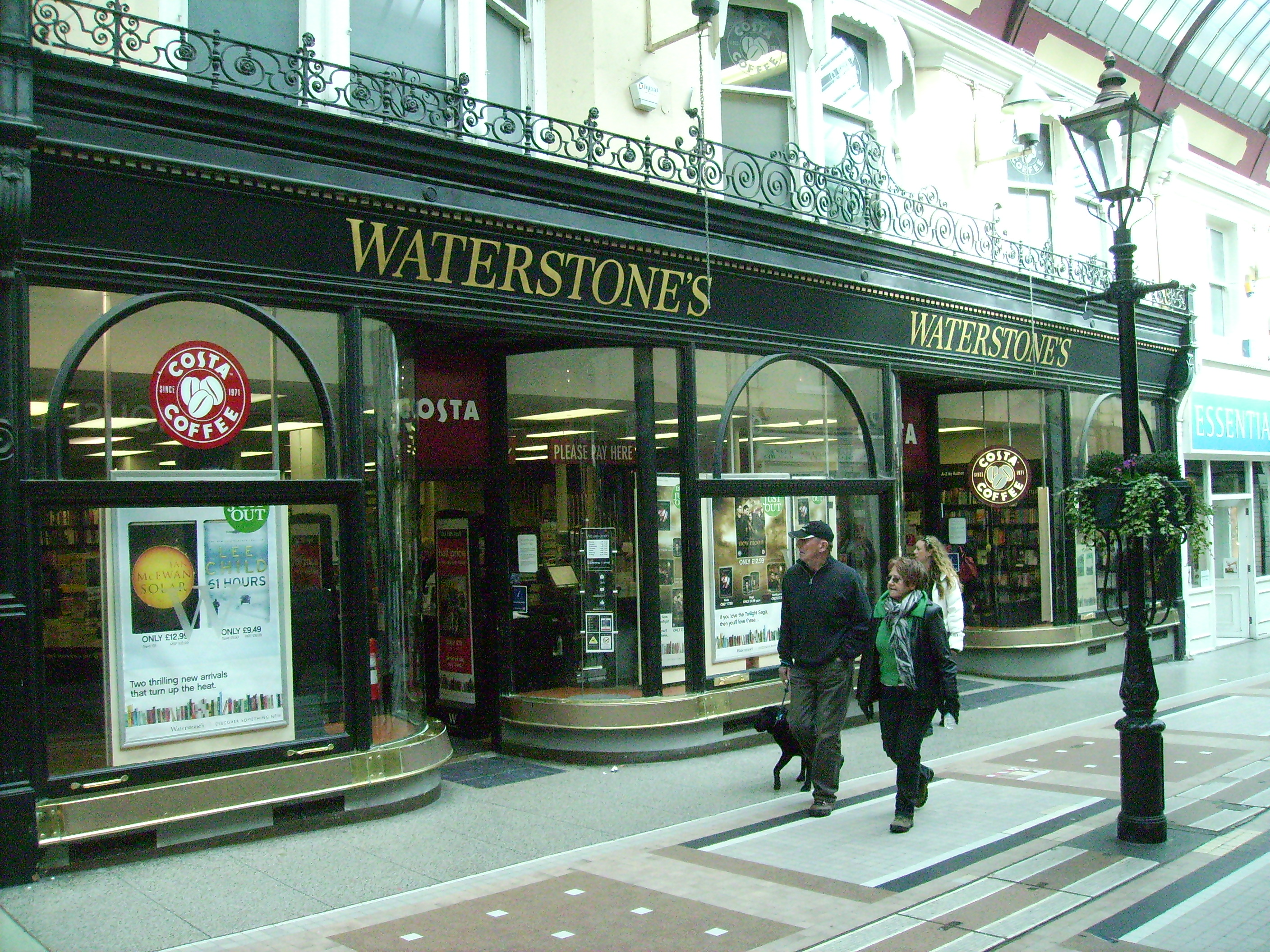 Eine kleinere Waterstones-Filiale in Bournemouth (U.K.)